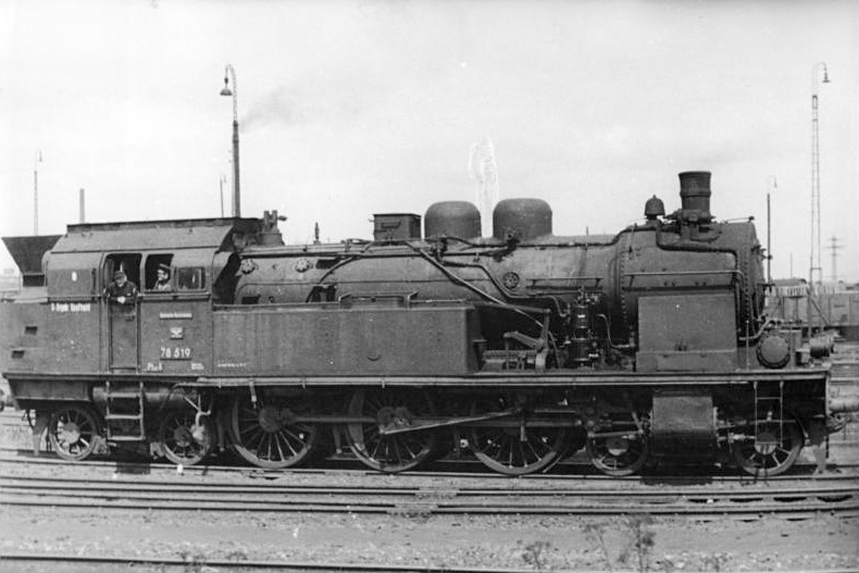 Dampflok 78 519 (BR 78) Zentralbild Schmidtke 7.8.1952 Lokomotivtypen der Deutschen Reichsbahn. UBz: Baureihe 78